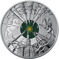 Ювілейна монета "Холодний Яр". Реверс